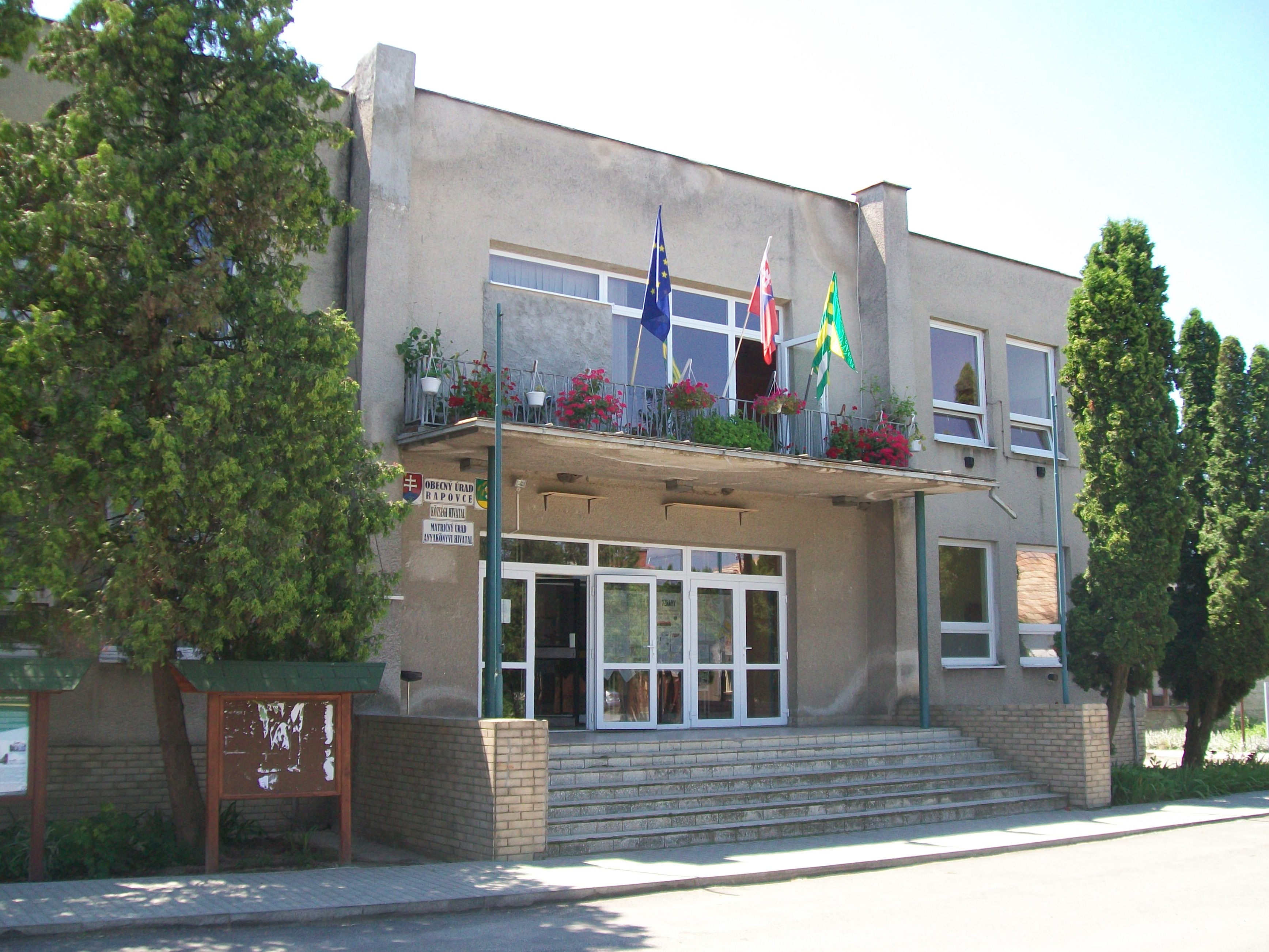 Obecný úrad v Rapovciach